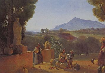 Pumpkin harvest at Malvalatlabel QS:Len,"Pumpkin harvest at Malvalat"label QS:Lfr,"La Récolte des citrouilles à la Bastide de Malvalat"